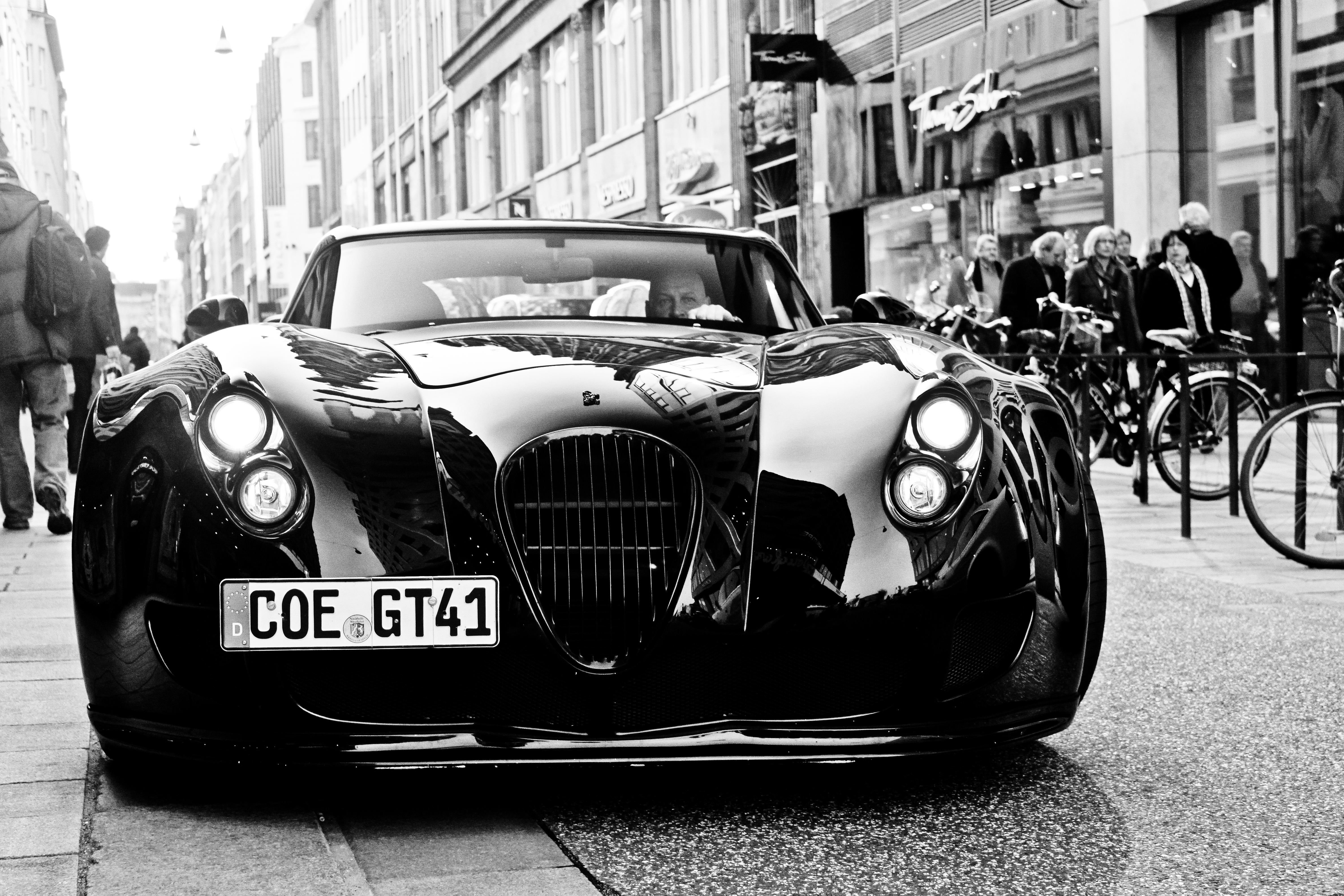 Une Wiesmann GT MF5 à Hamburg en 2011